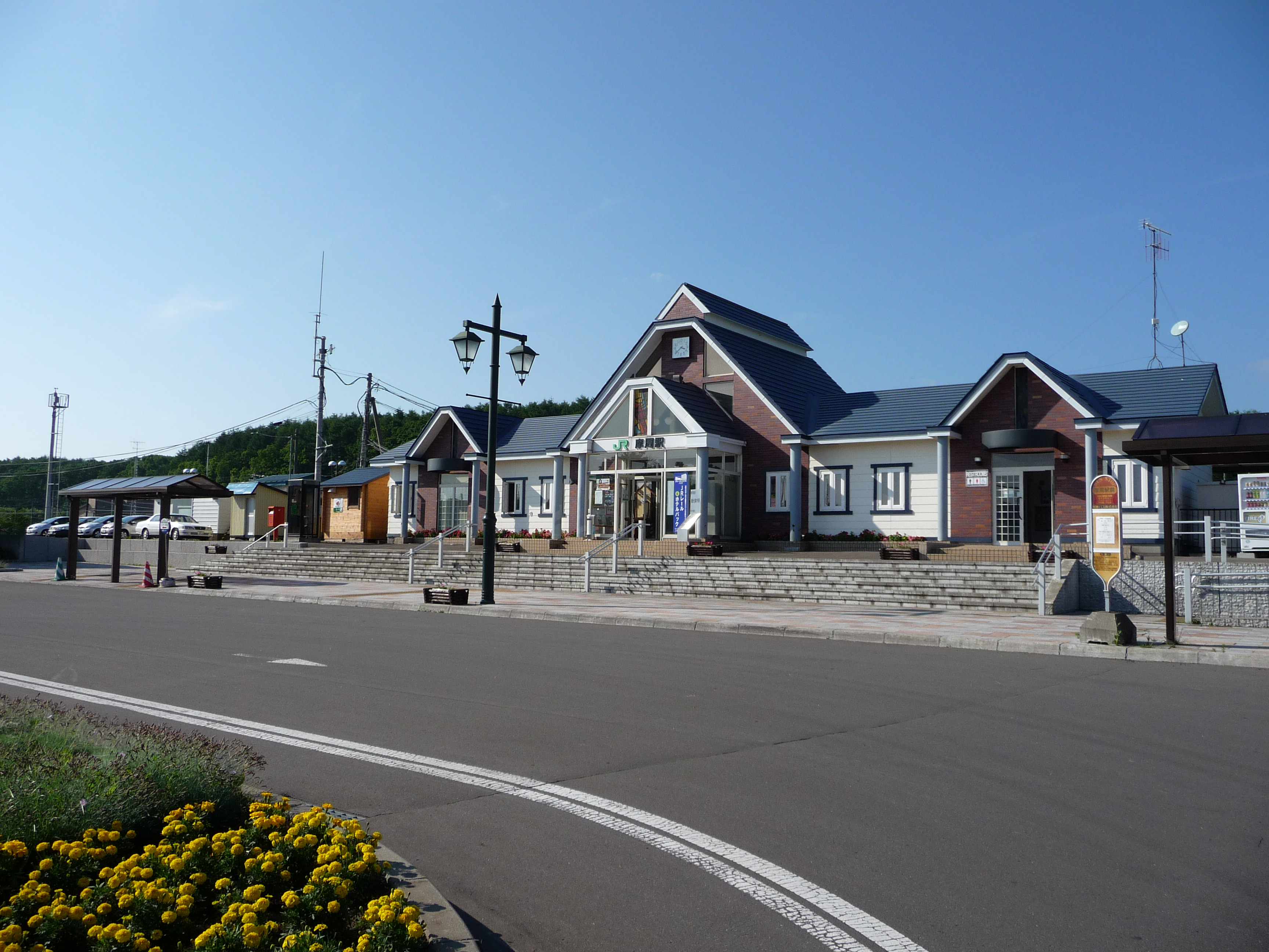 JR北海道摩周駅駅舎